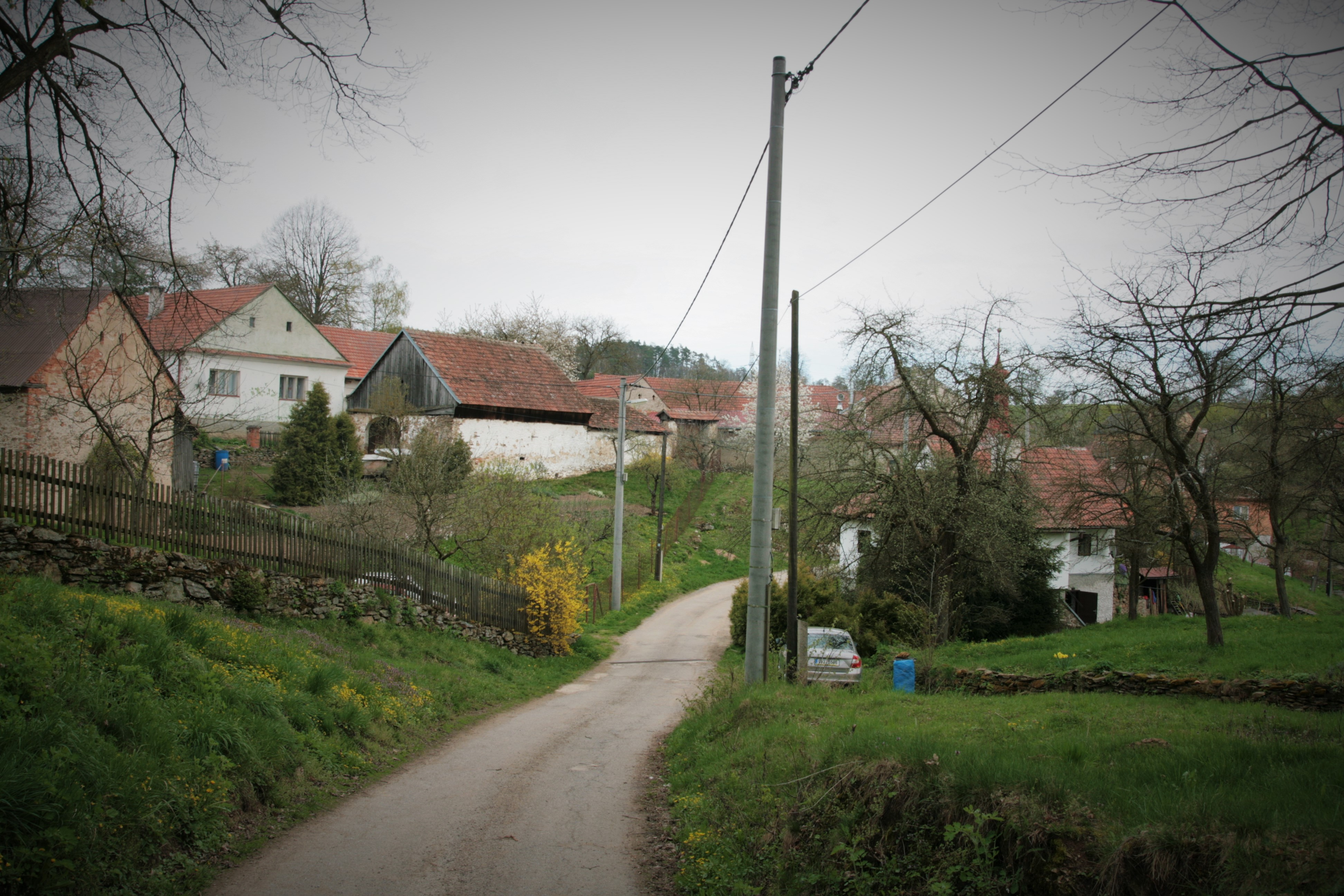 Vesnice Jilmoví, část obce Pernštejnské Jestřabí v okrese Brno-venkov. Průhled od západu.